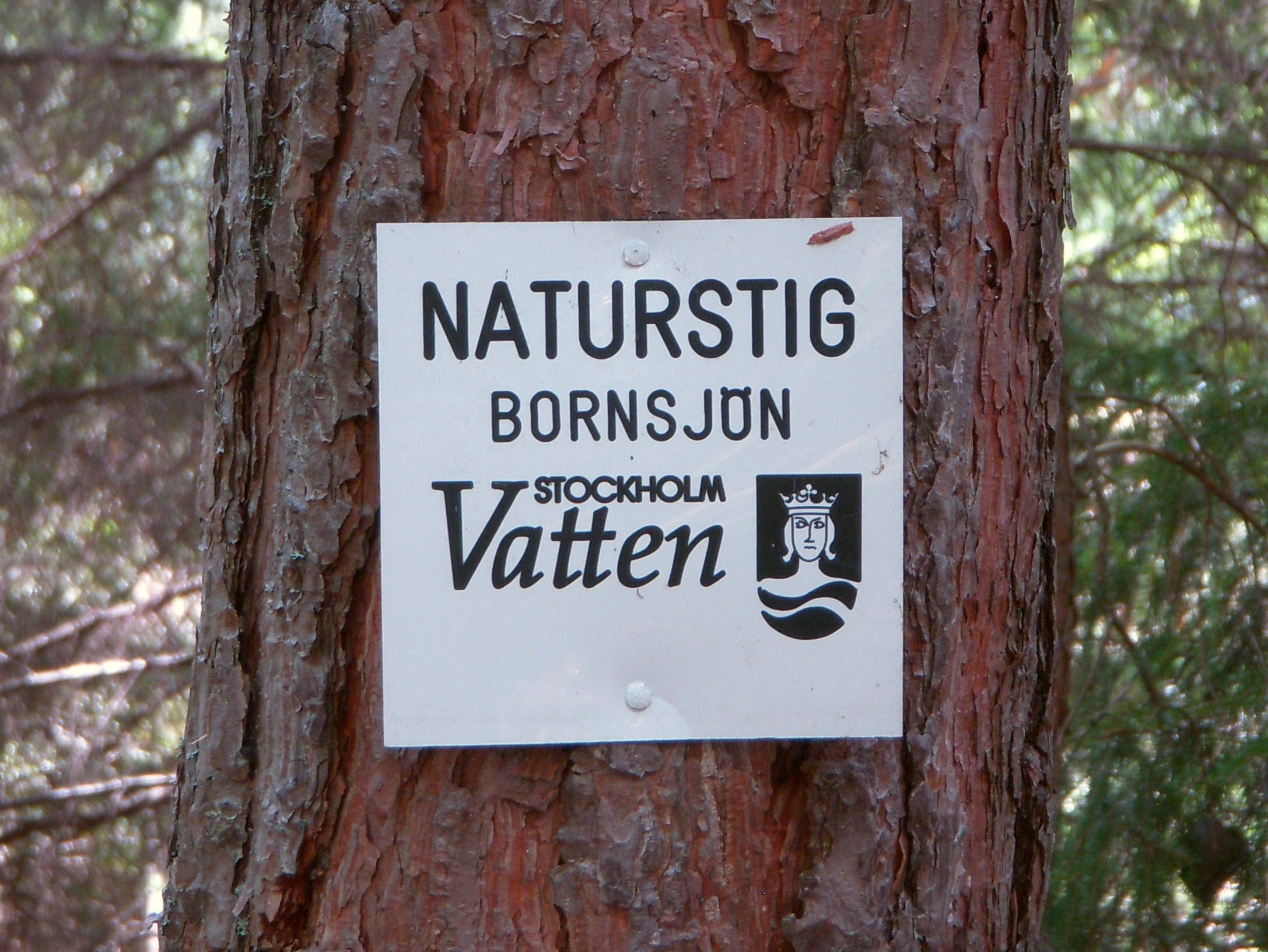 Bornsjöns naturreserevat